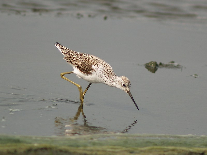 Tringa stagnatilis（小青足鷸）, Changhua County, Taiwan, 2007.